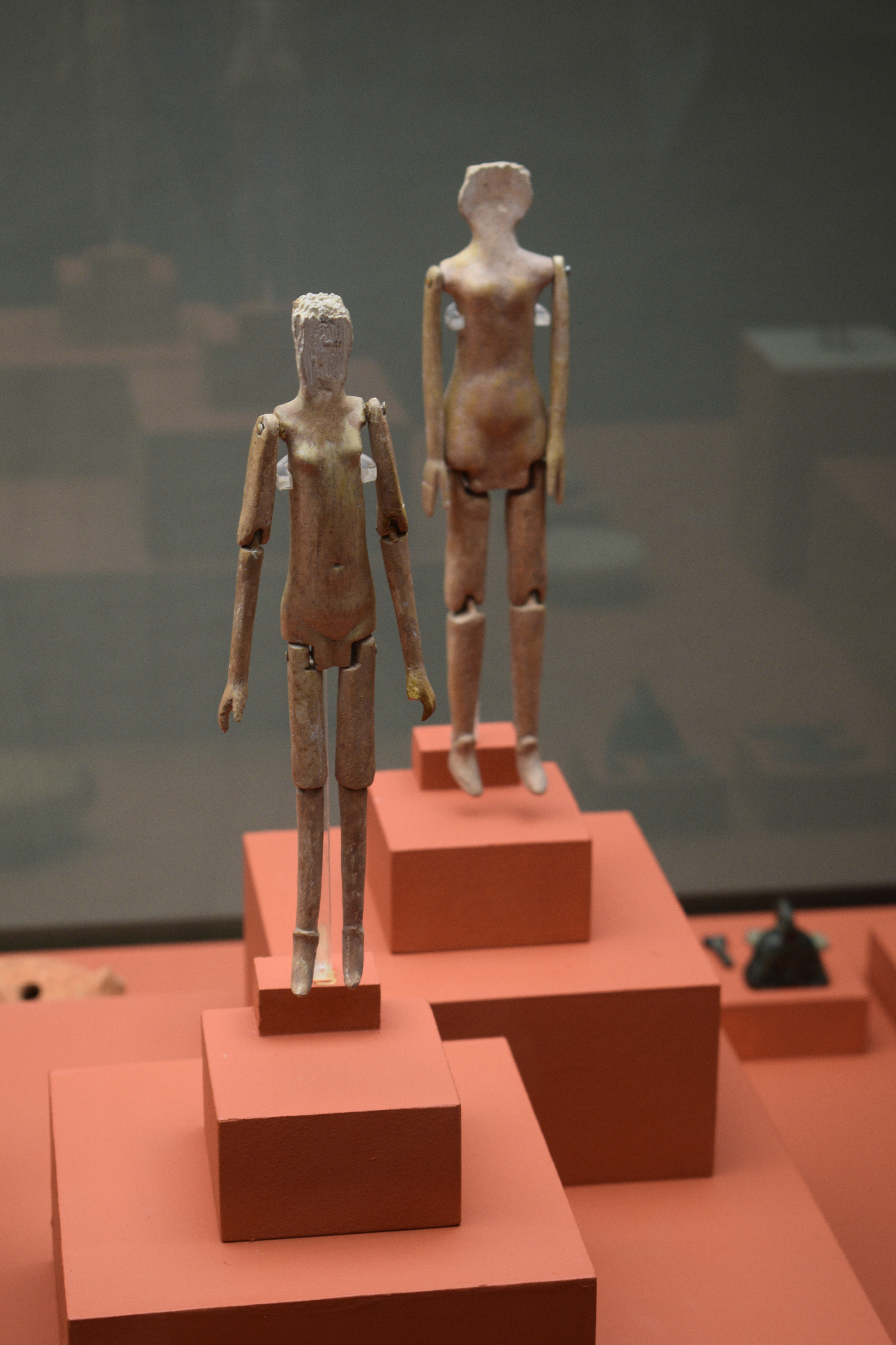 Museo de Albacete. Muñecas articuladas (s. IV d.C.)Provenientes de Las Eras (Ontur).Hueso y ámbar.